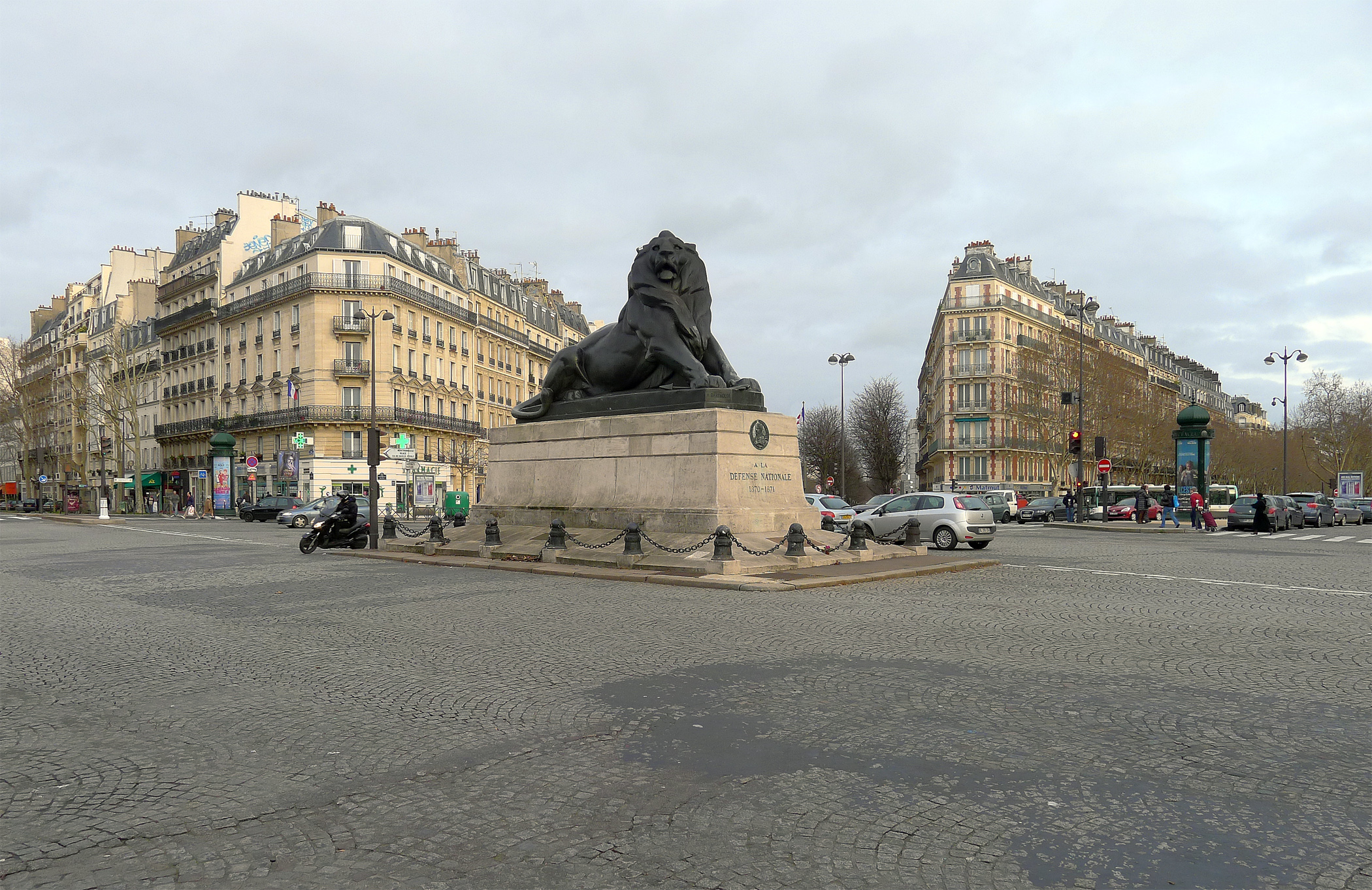 Place Denfert-Rochereau avec la réplique du Lion de Belfort en son centre - Paris XIV